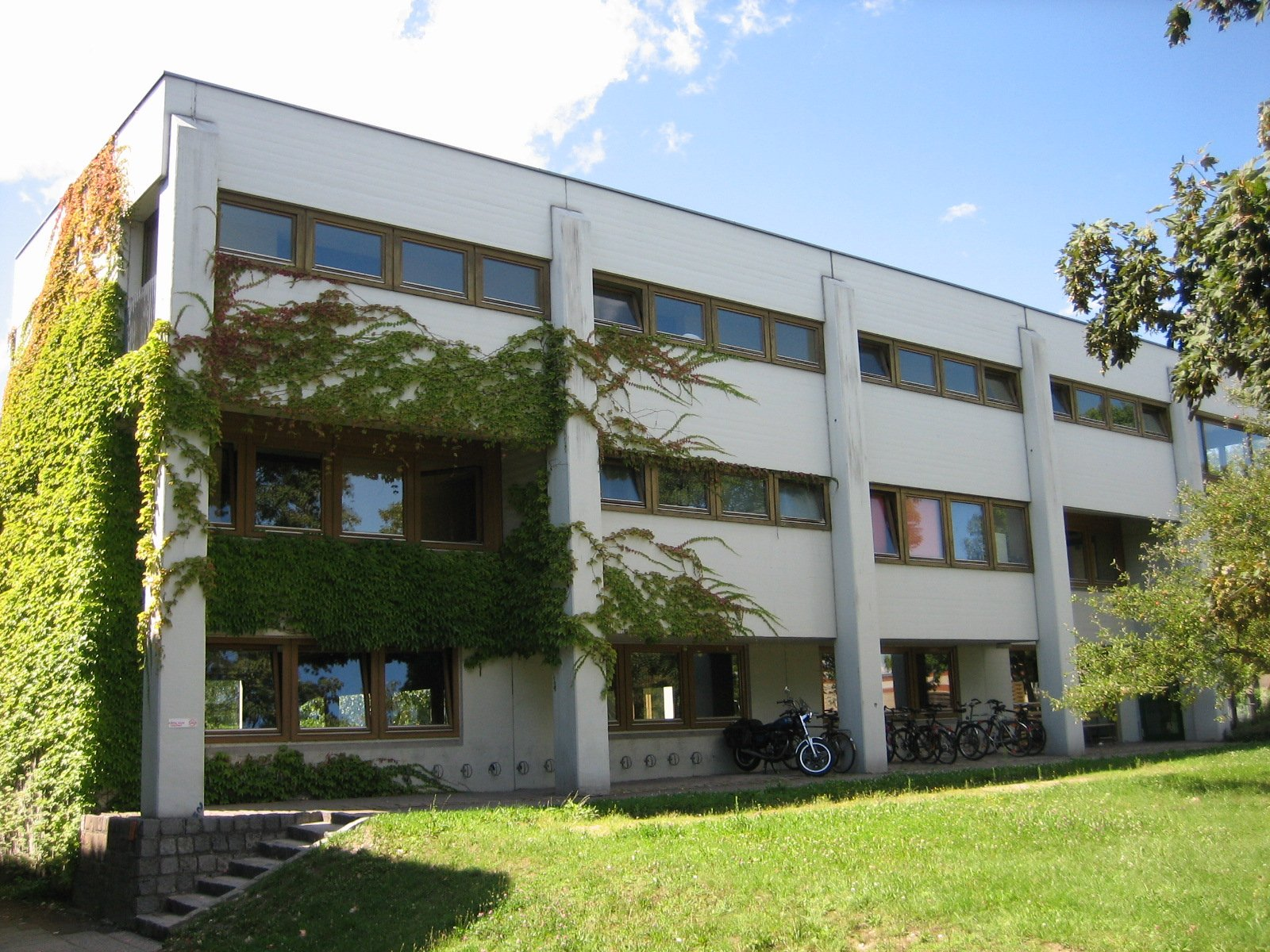 Bayernkolleg in Augsburg, Blick auf das Wohnheim vom Innenbereich